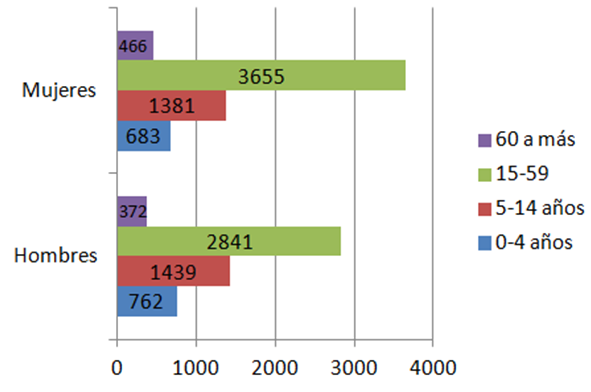 Tabla de Población de la localidad celayense de San Miguel Octopan